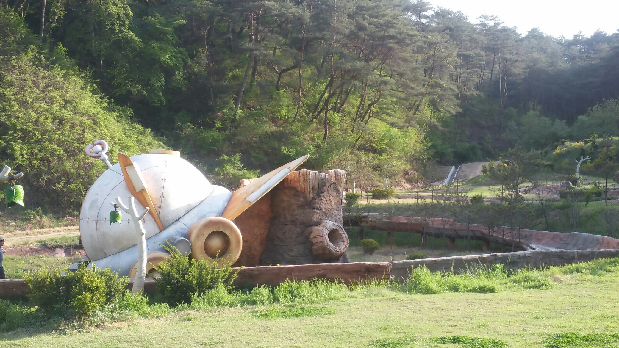 봉화에 있는 후토스 촬영지다.